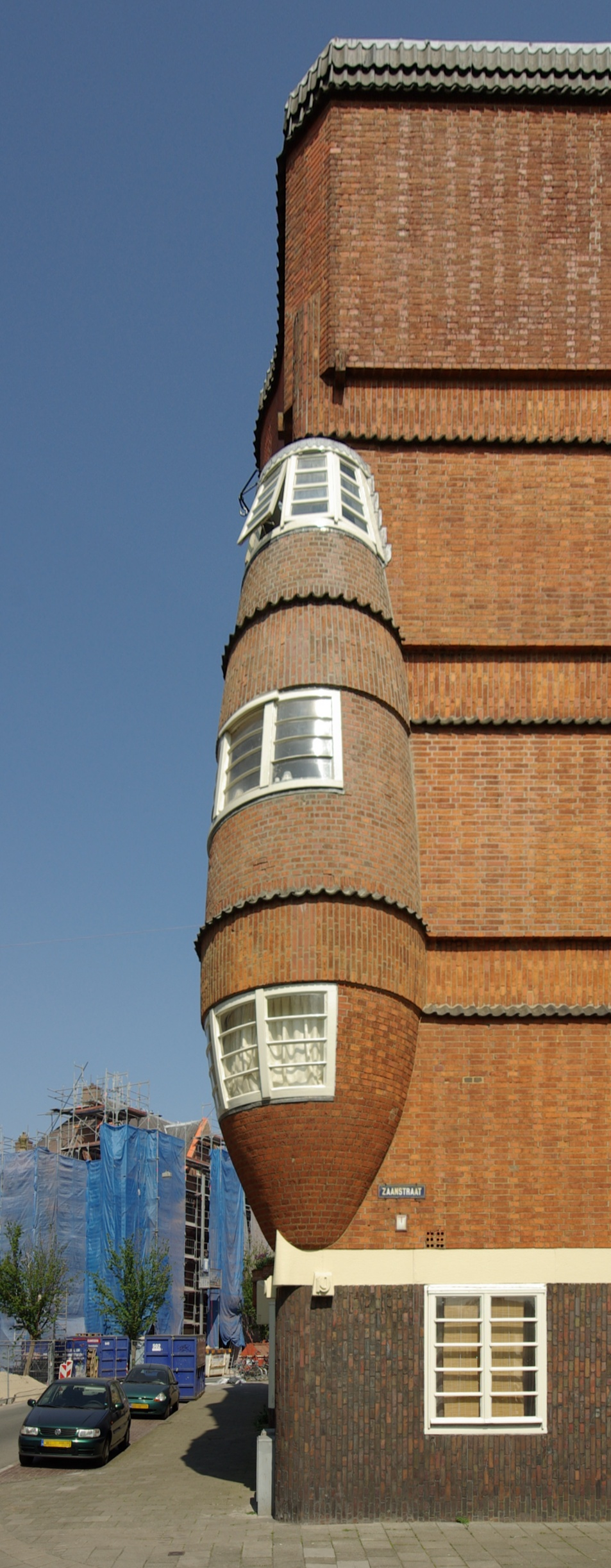 Gebouw Het Schip in Amsterdam 8″ N, 4° 52′ 27.06″ E